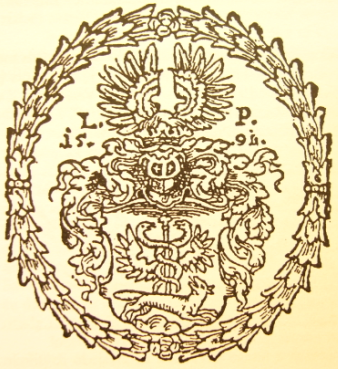 A Pécsi család címere, Pécsi Lukács fametszete (1591)